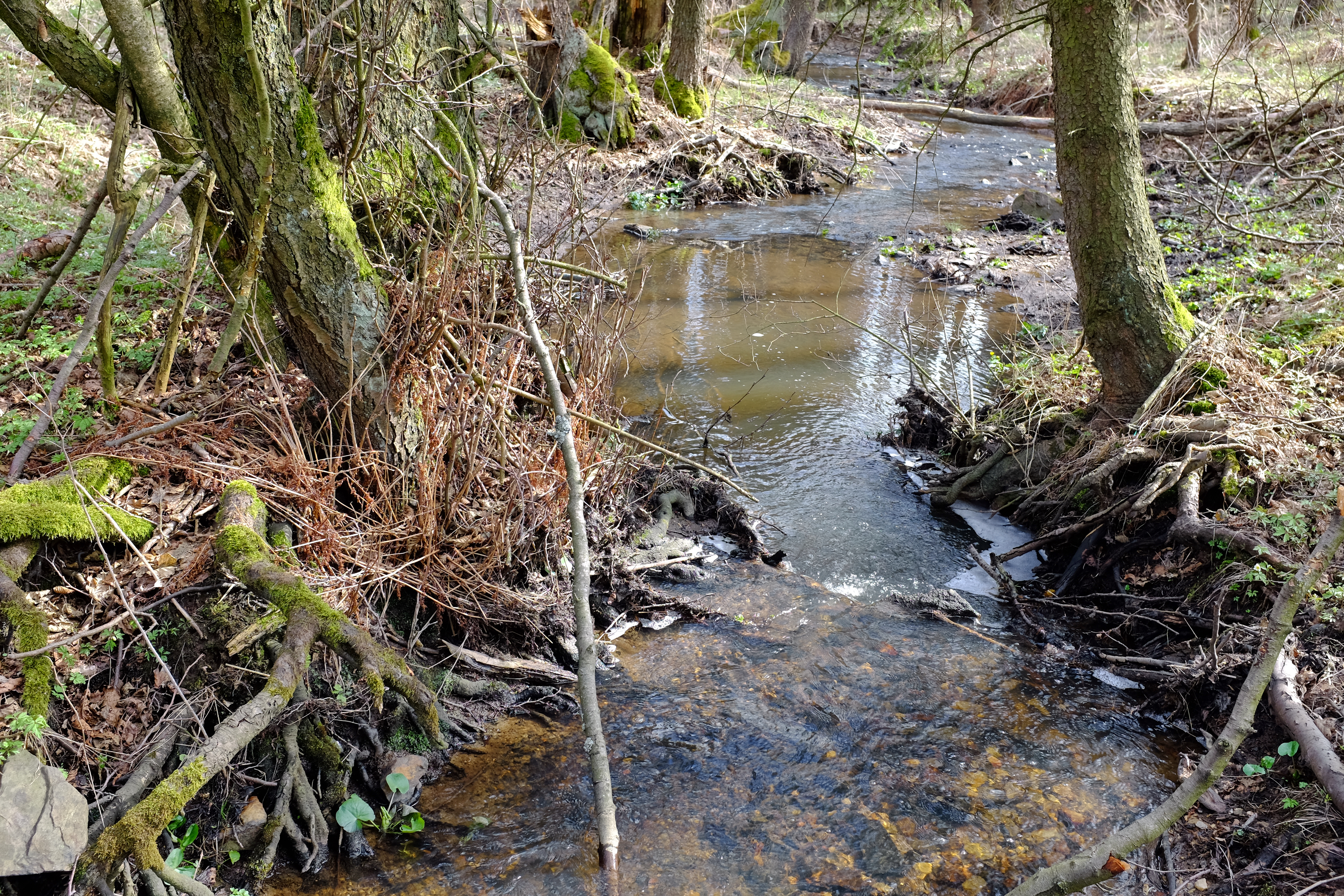 Podhájský potok, přítok Hadovky, Tepelská vrchovina, okres Cheb